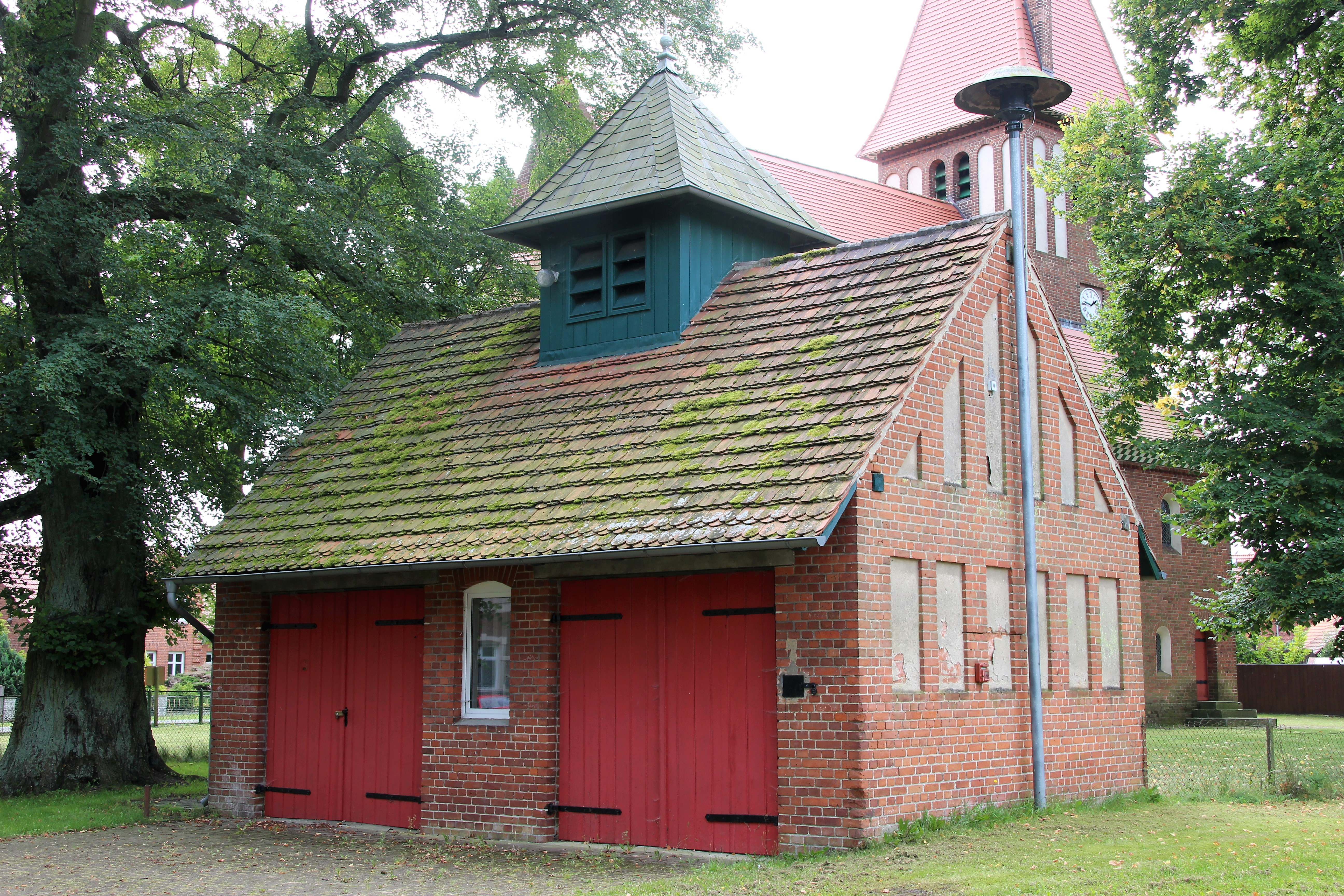 Baudenkmal Dorfstraße Spritzenhaus